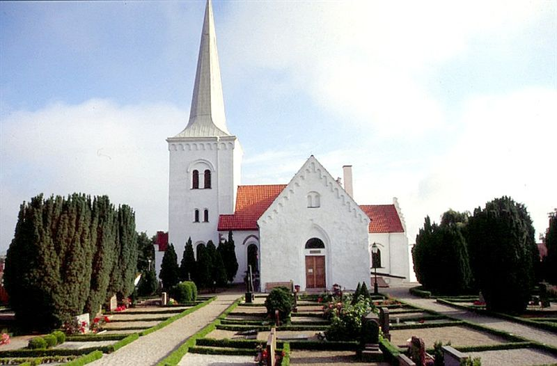 Anderslöv kyrka i Skåne, Sverige. Anderslöv kirke